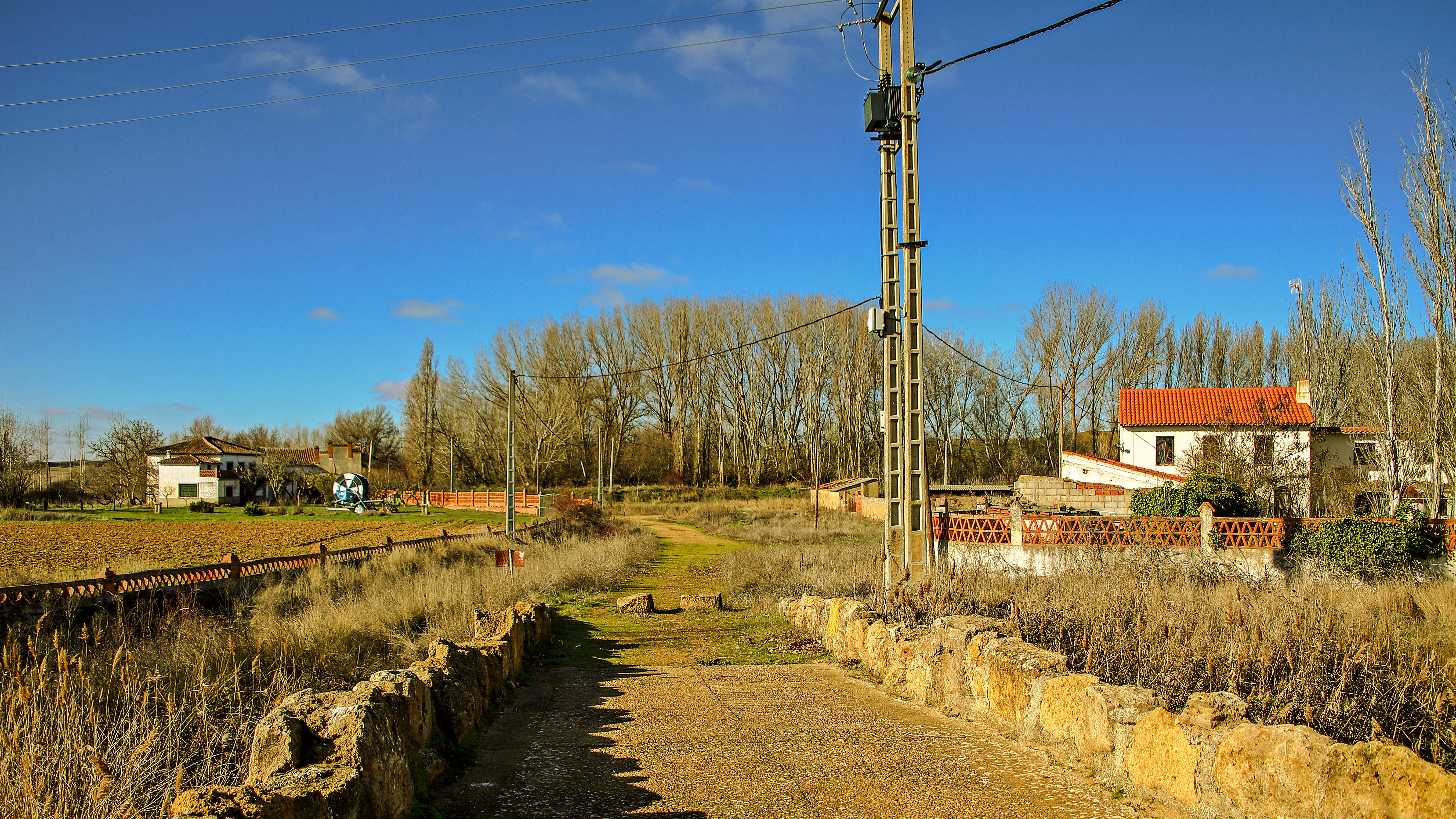 Molino de Alaiz es un despoblado del municipio de Fuentes de Ropel, comarca de Benavente y Los Vales, provincia de Zamora.